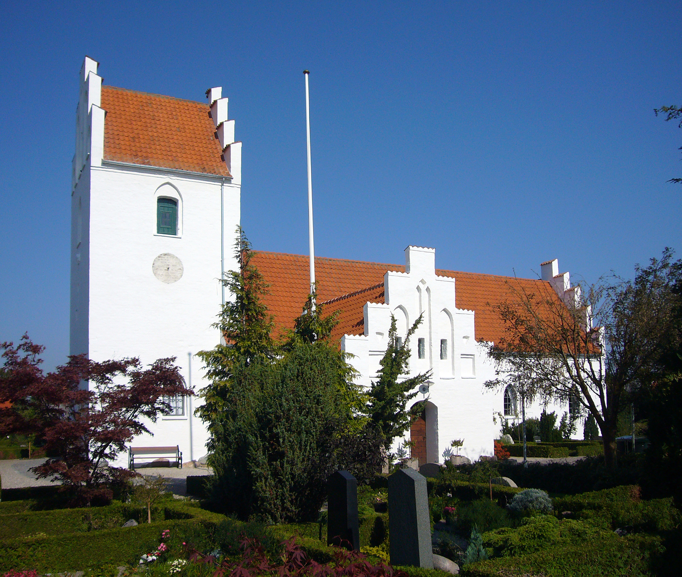 Karlslunde Kirke in Roskilde County, Denmark